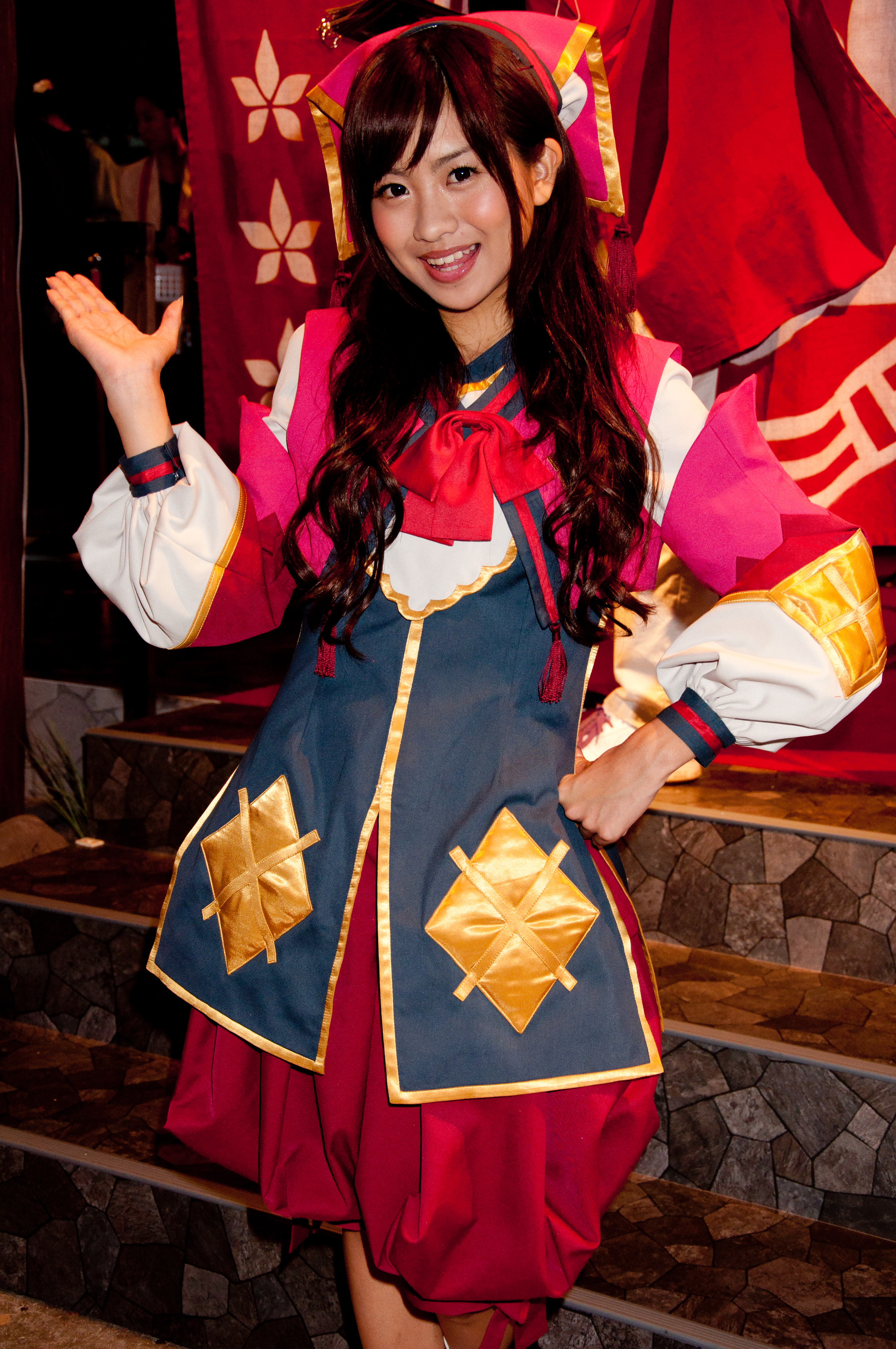 2010東京電玩展，卡普空攤位的《魔物獵人》宣傳模特兒曾田茉莉江。